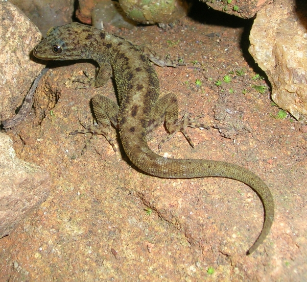 Cnemaspis sp. gecko, Wayanad, India